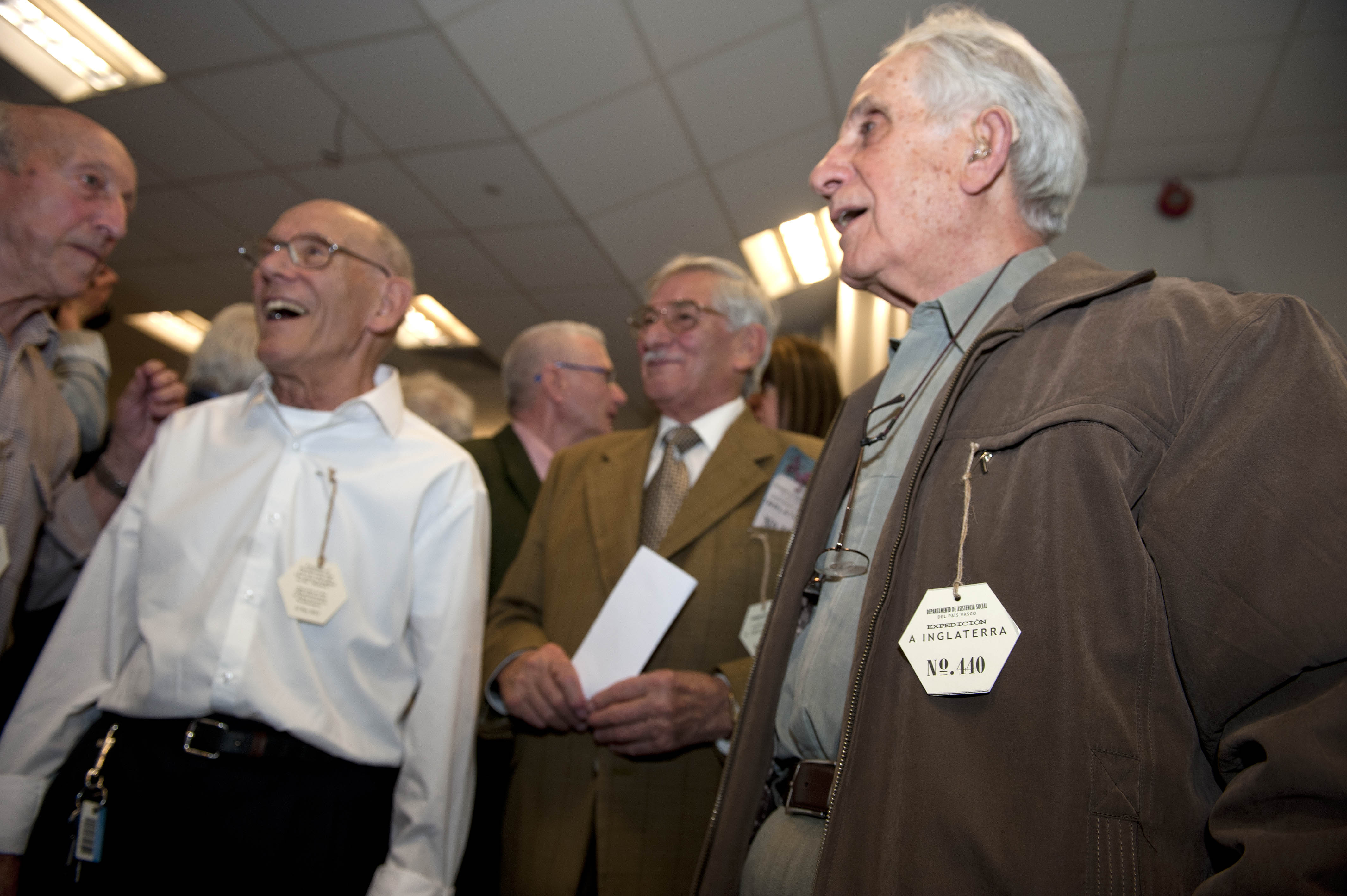 El Gobierno Vasco conmemora en Southampton el 75º aniversario de los "niños de la guerra" en Reino Unido